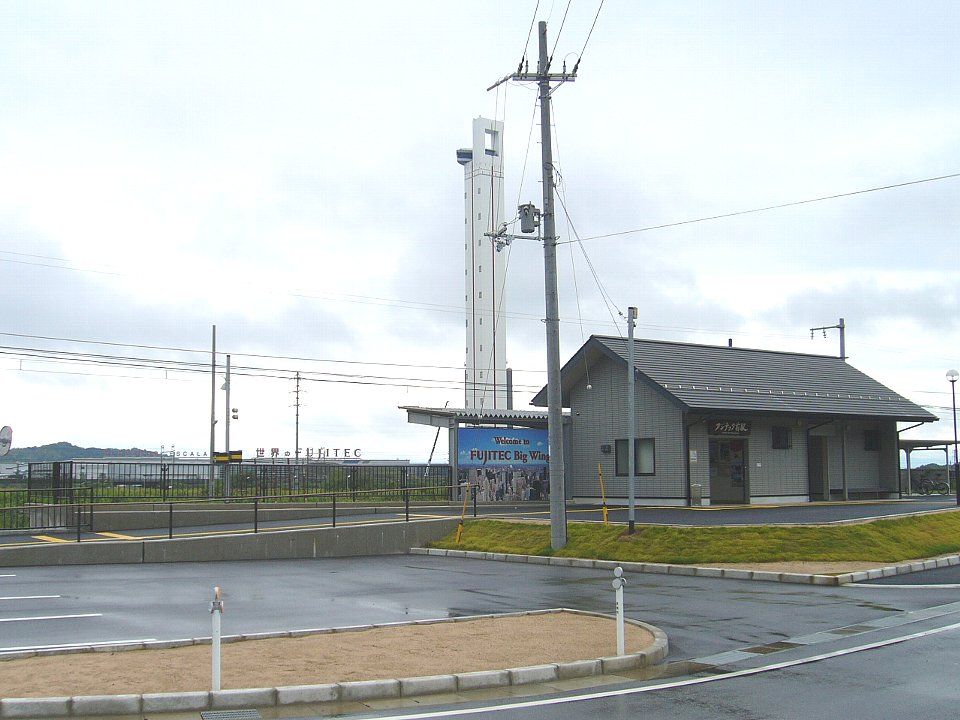 近江鉄道フジテック前駅